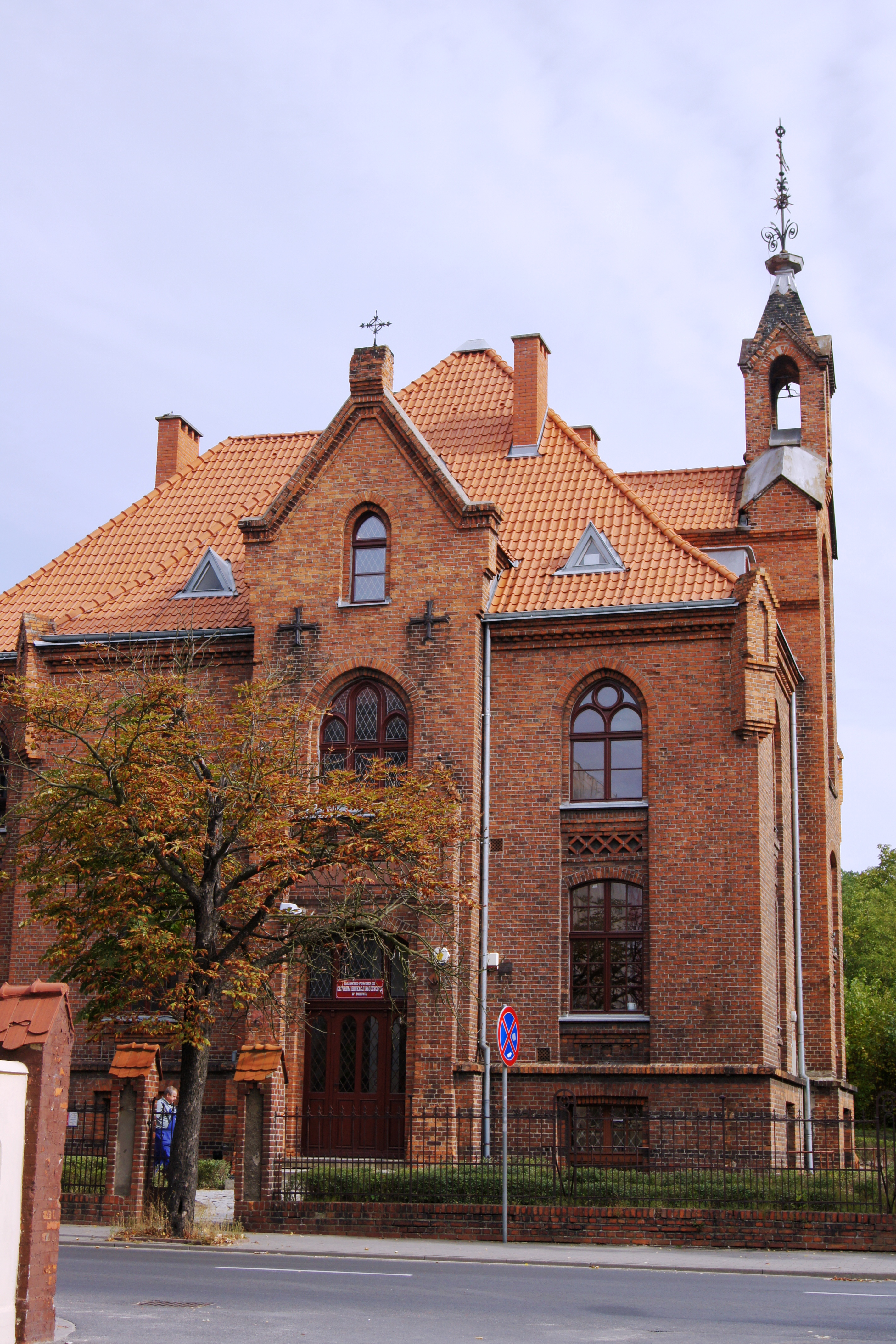 Toruń, ul. Sienkiewicza 36 - dawny dom starców, obecnie Nauczycielskie Kolegium Języków Obcych, 1886-1887 (zabytek nr A/274)